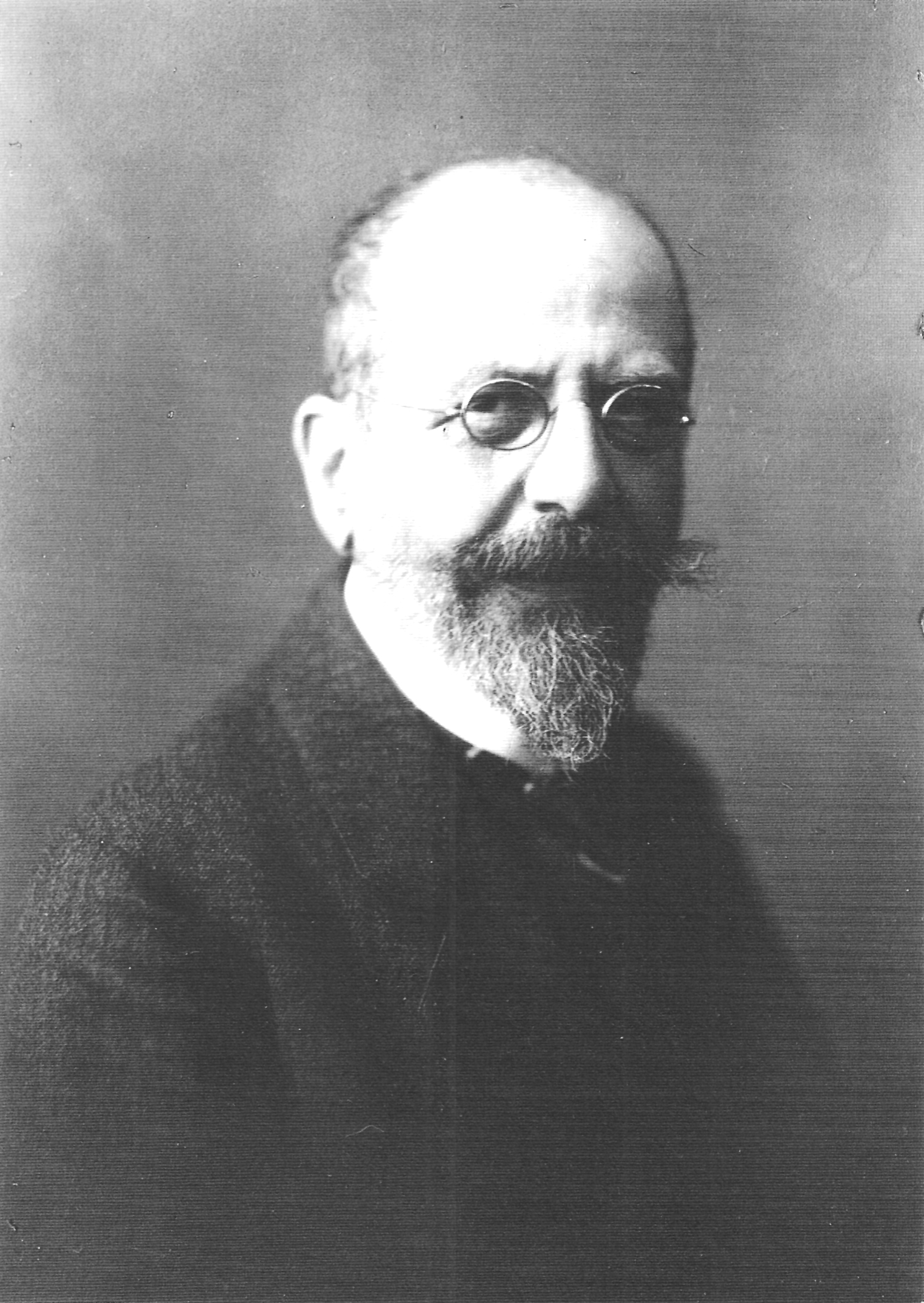 Karl Schickhardt (Fotografie)